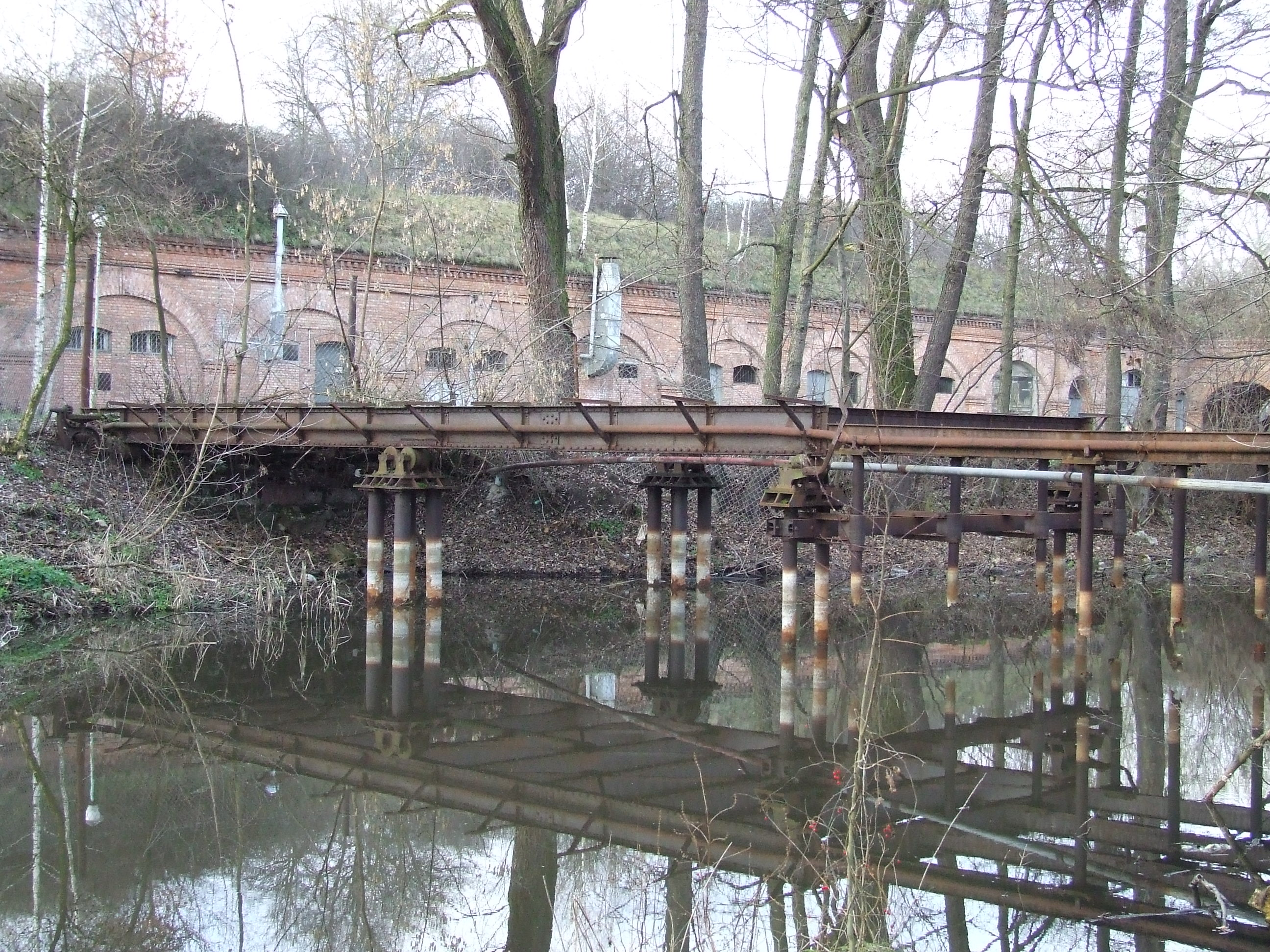 Most zwodzony-wciągany nad fosą Fortu Radiowo